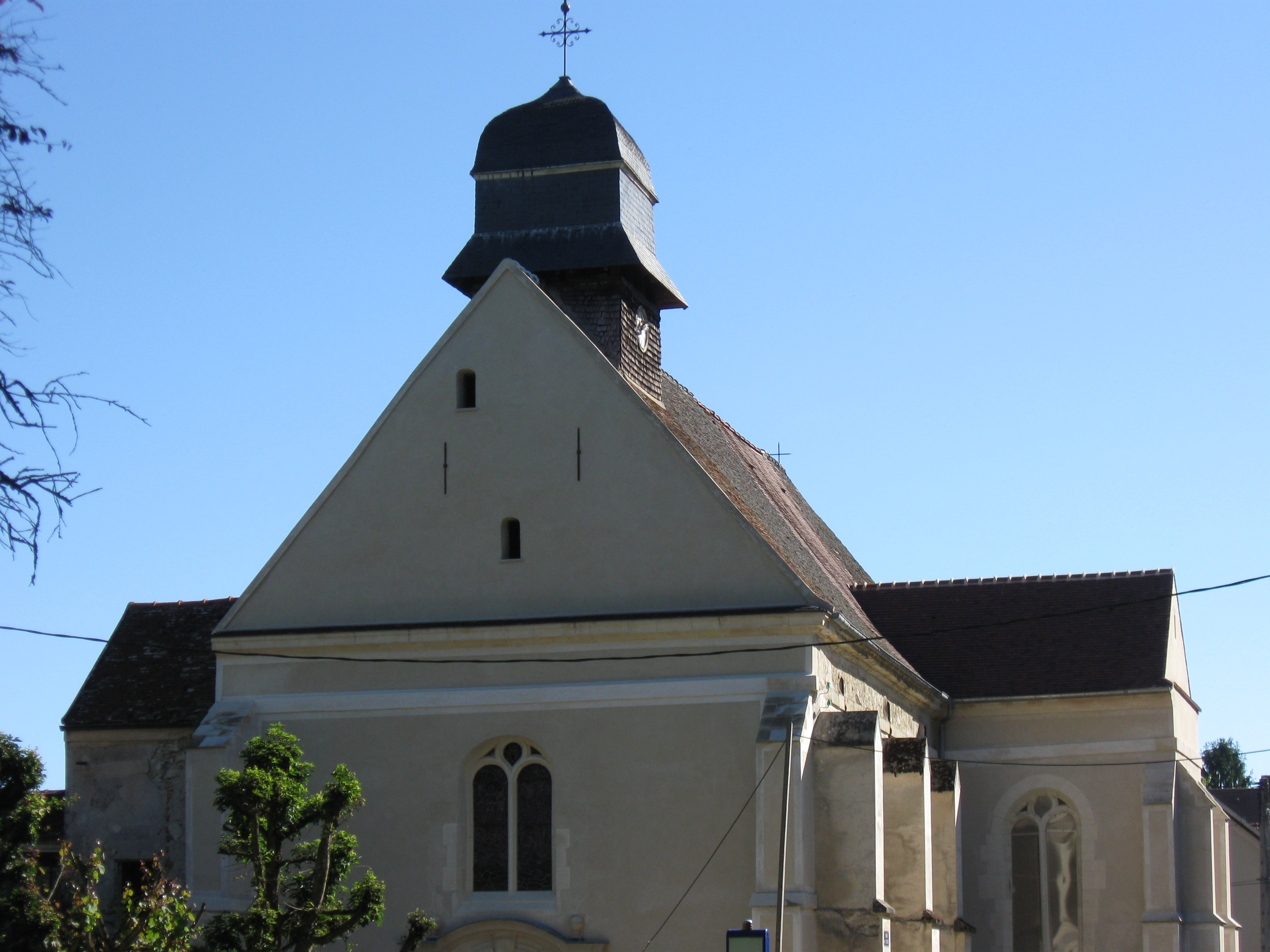 Église Saint-Saturnin de Chauconin (Chauconin-Neufmontiers, Seine-et-Marne, région Île-de-France). .